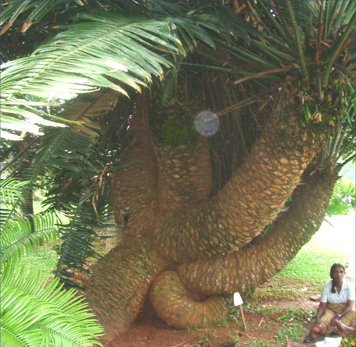 Jardi botanic de Peradeniya a la provincia Central, prop de Kandy, Sri Lanka, imatge feta per J. Ollé el juliol del 2006